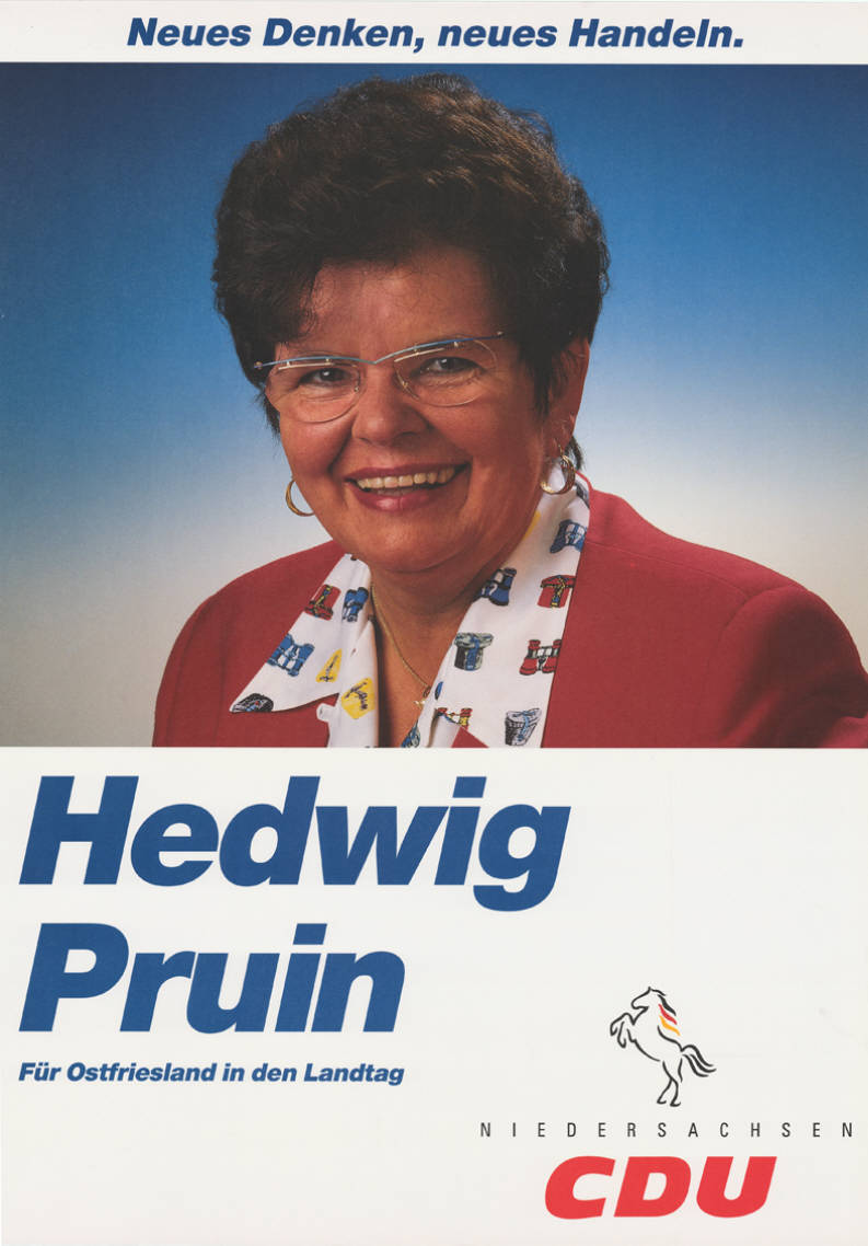 Neues Denken, neues Handeln. Hedwig Pruin Für Ostfriesland in den Landtag Niedersachsen CDUAbbildung:Porträtfoto - Niedersachsenross mit NationalfarbenPlakatart:Kandidaten-/Personenplakat mit PorträtAuftraggeber:CDU NiedersachsenObjekt-Signatur:10-008 : 1135Bestand:Landtagswahlplakate Niedersachsen (10-008)GliederungBestand10-18:Landtagswahlplakate Niedersachsen (10-008) » CDULizenz:KAS/ACDP 10-008 : 1135 CC-BY-SA 3.0 DE